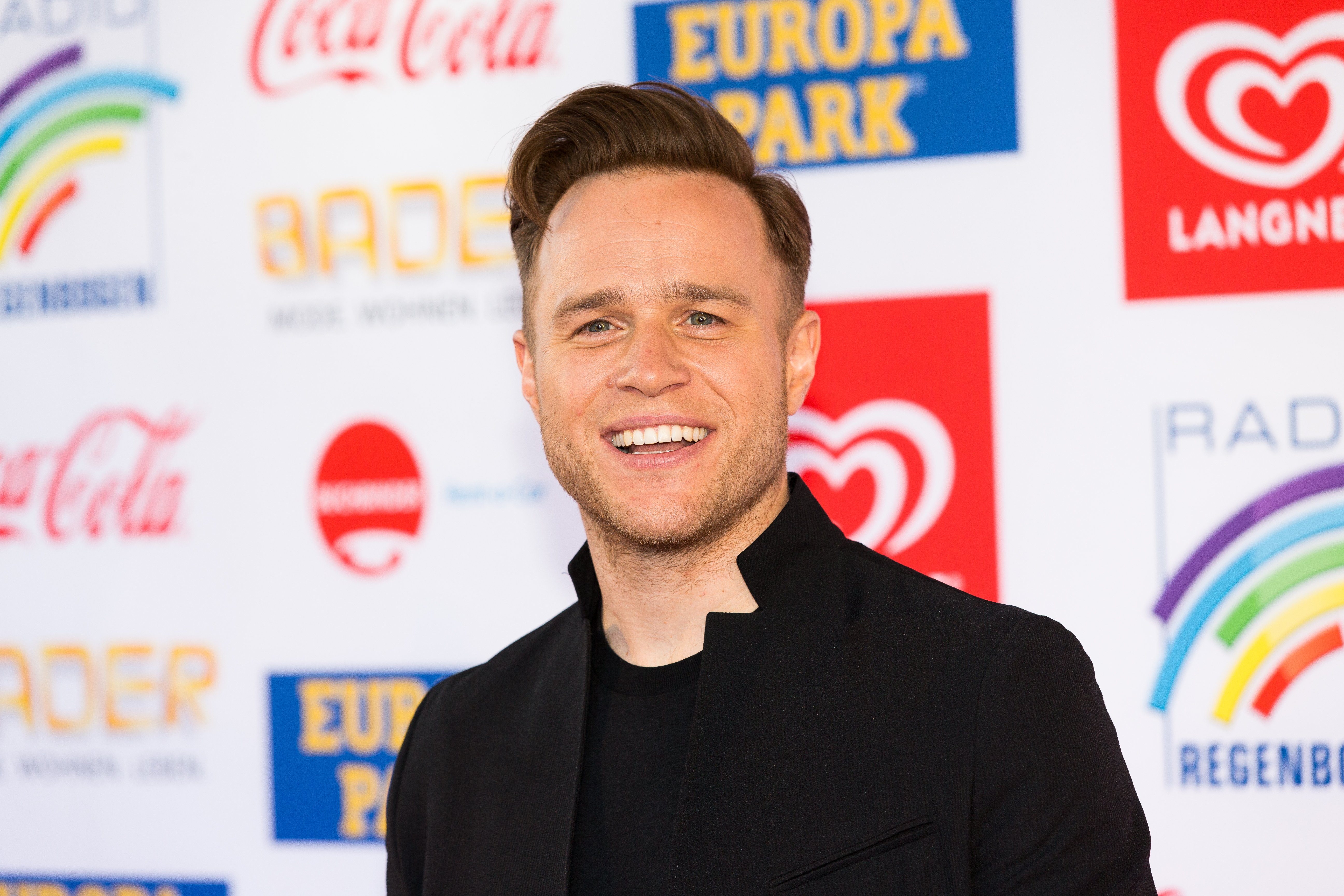 during Radio Regenbogen Award 2017 at Europapark, Rust, Baden-Württemberg, Germany on 2017-04-07, Photo: Sven Mandel